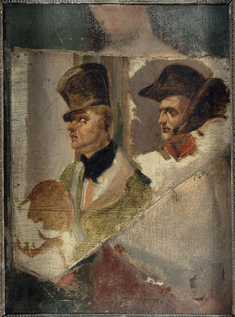 Deux portraits d'hommes de profil, coiffés, l'un d'un bicorne, l'autre d'un shako.